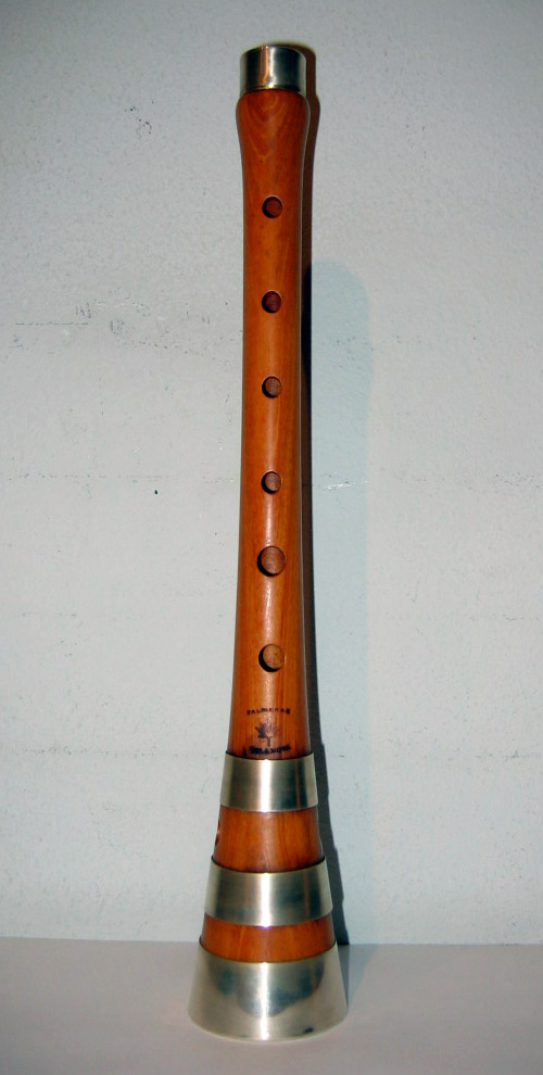 Gralla construïda per el Luthier Xavier Orriols